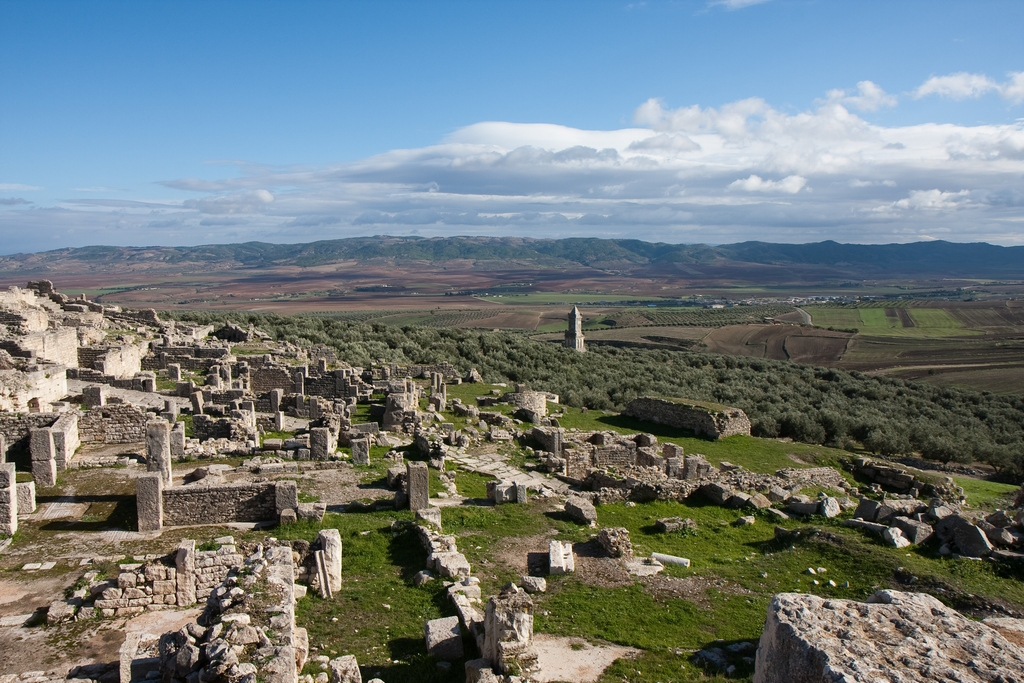 Paysage observé depuis les ruines de Dougga